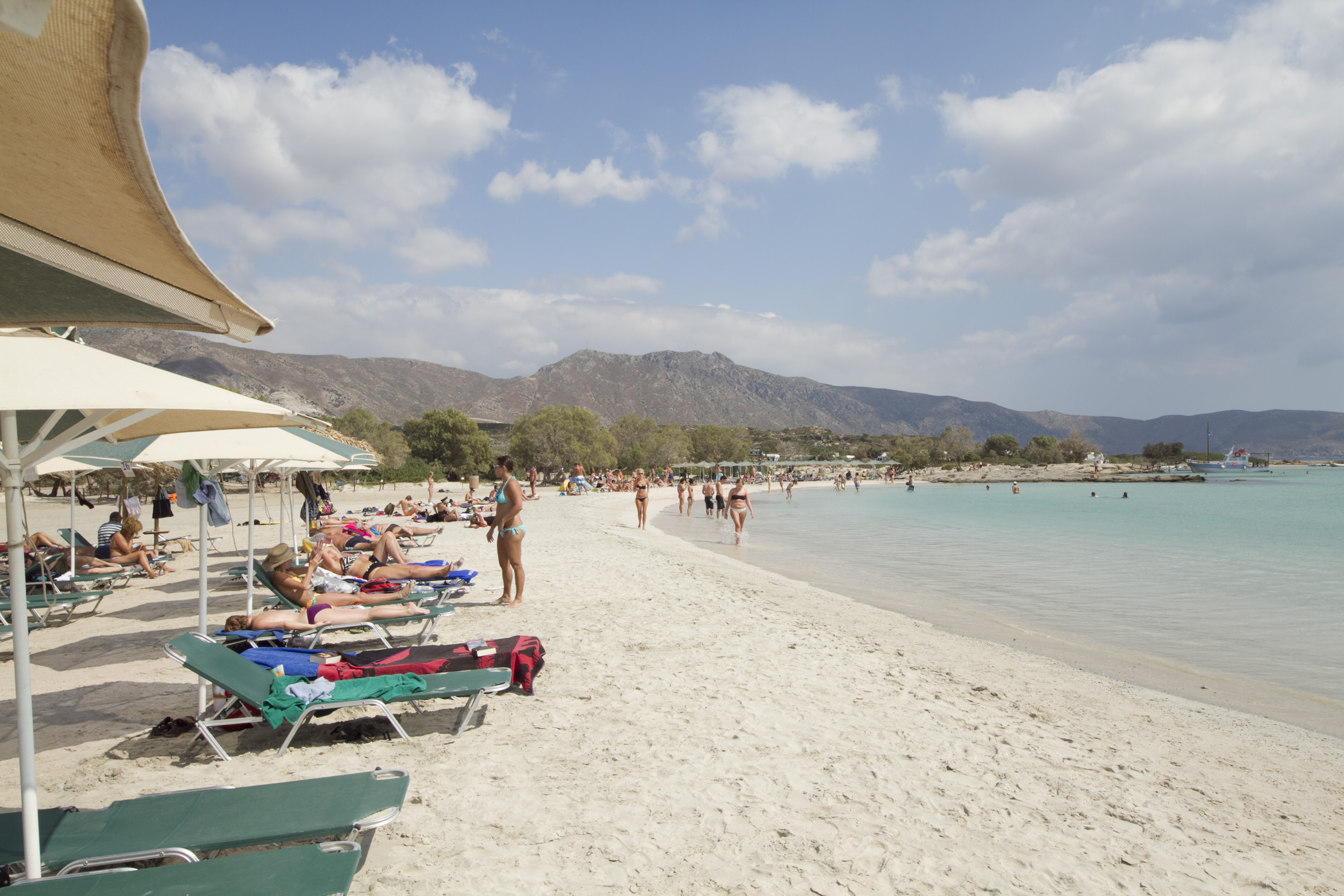 Elafonisi, Kandanos Selinos, Chania, Crete, Greece